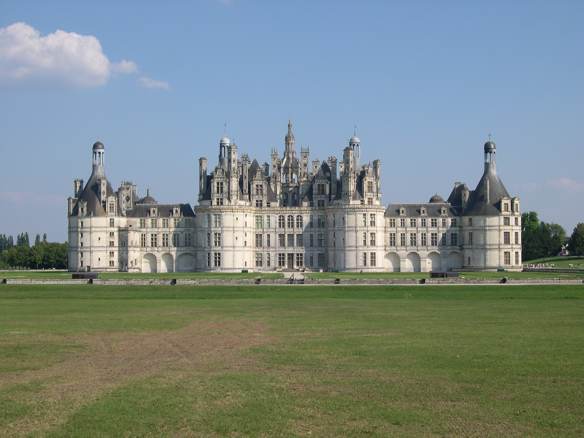 France Loir-et-Cher Château de Chambord Photographie prise par GIRAUD Patrick